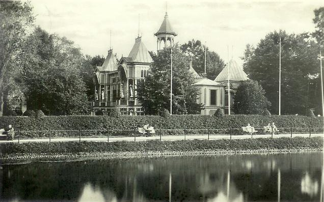 buildings, uppsala, sweden